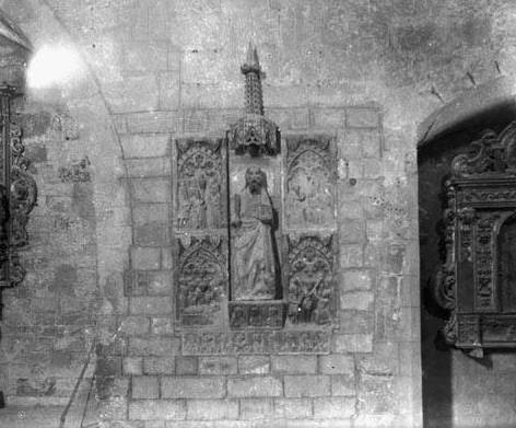 Retaule de Sant Bartomeu de Sant Pere de Cubells. Rafael Degollada i Castanys (Entre 1912 i 1924)